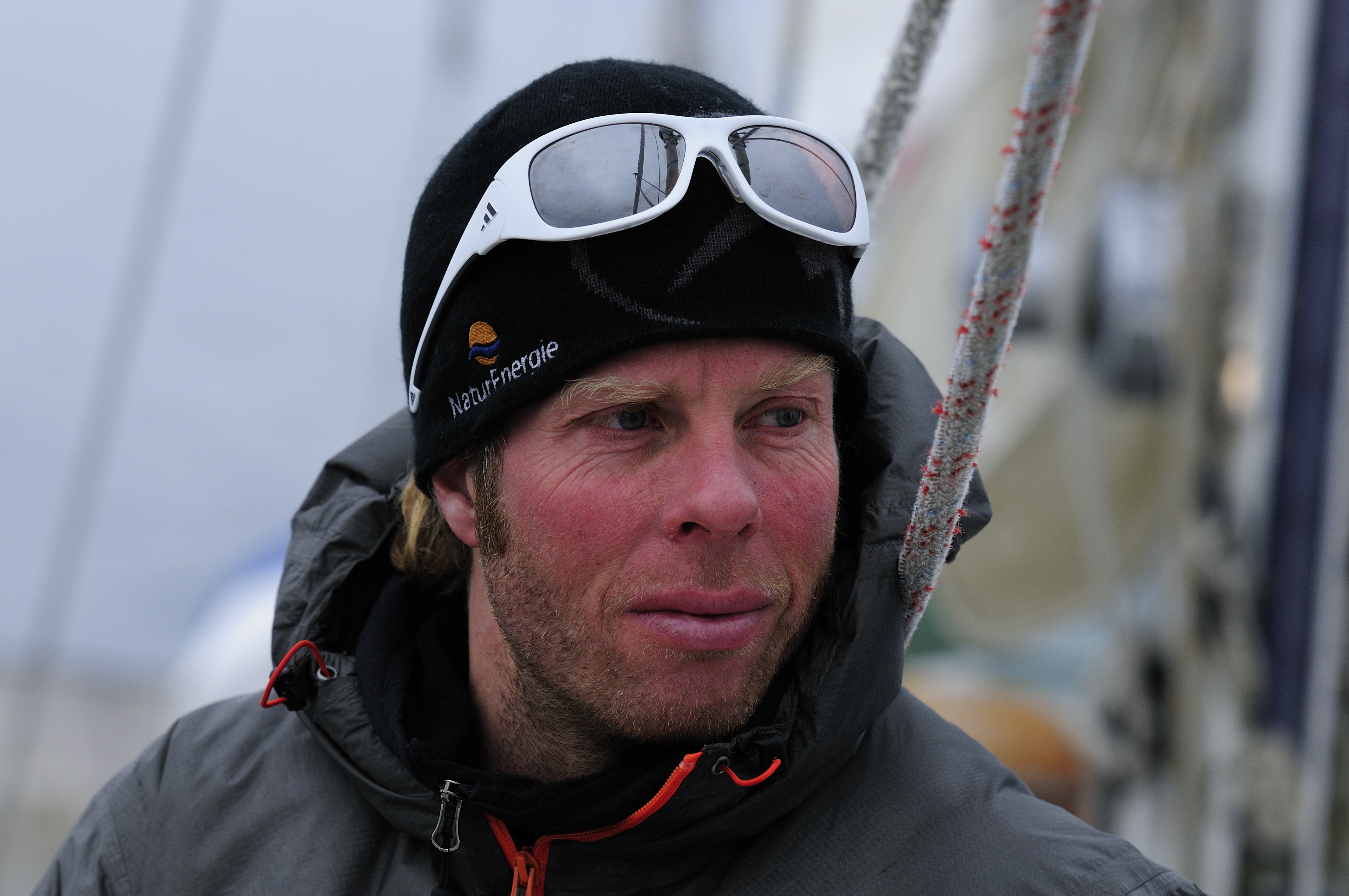 Robert Jasper in Feuerland auf Expedition zum Monte Sarmiento